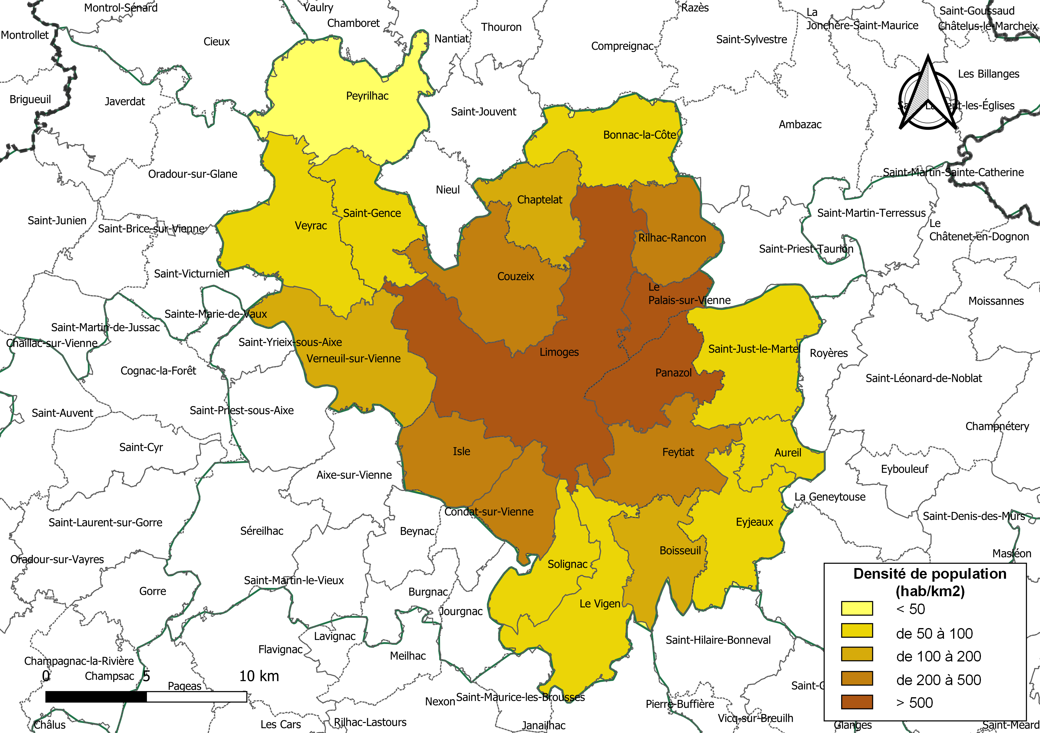 Carte des densités de population (millésimée 2016) des communes de la Communauté urbaine Limoges Métropole, département de la Haute-Vienne, France. Composition au 1er janvier 2019.